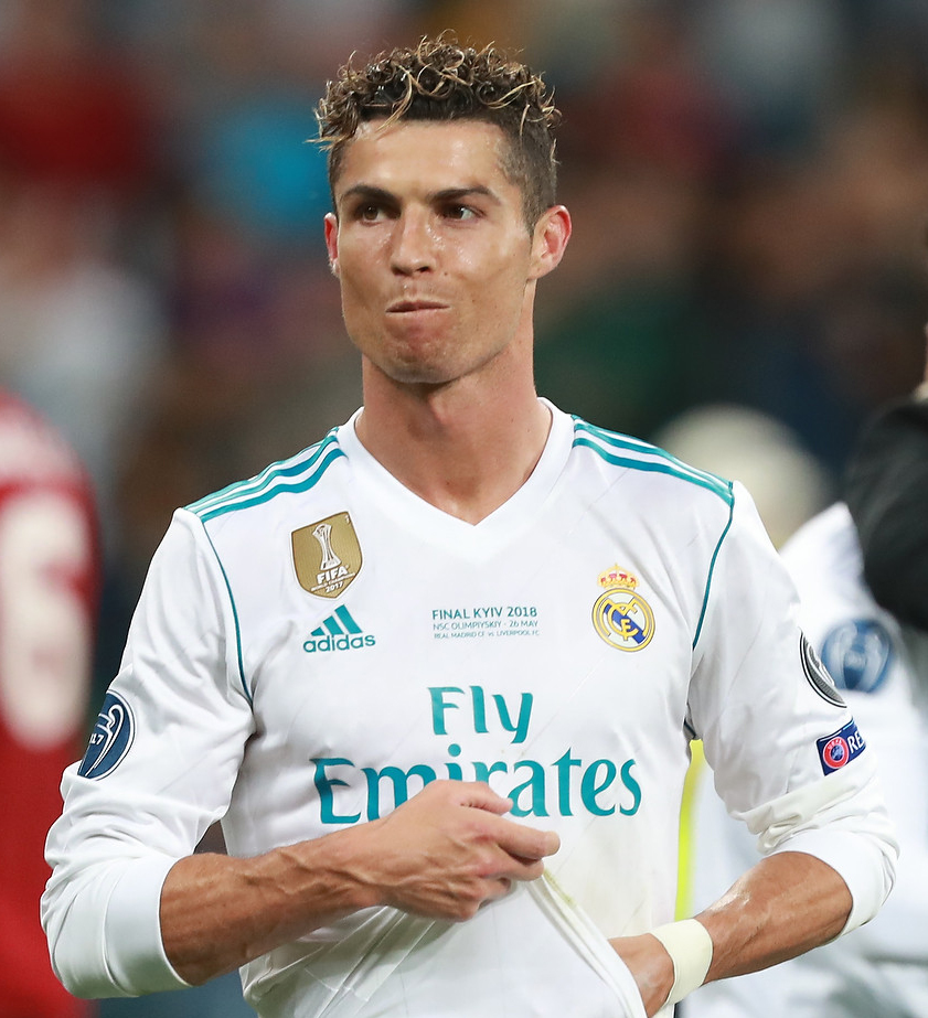 Финал ЛЧ в Киеве: 13-й кубок «Реала» и слёзы «Ливерпуля»